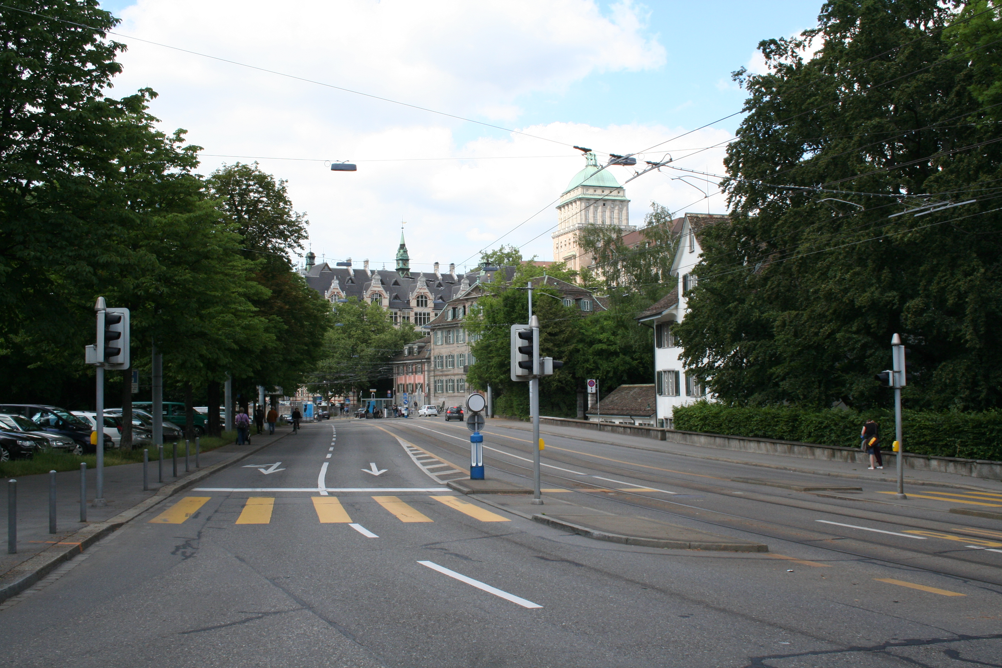 mittlerer Hirschengraben Richtung Norden zum Central